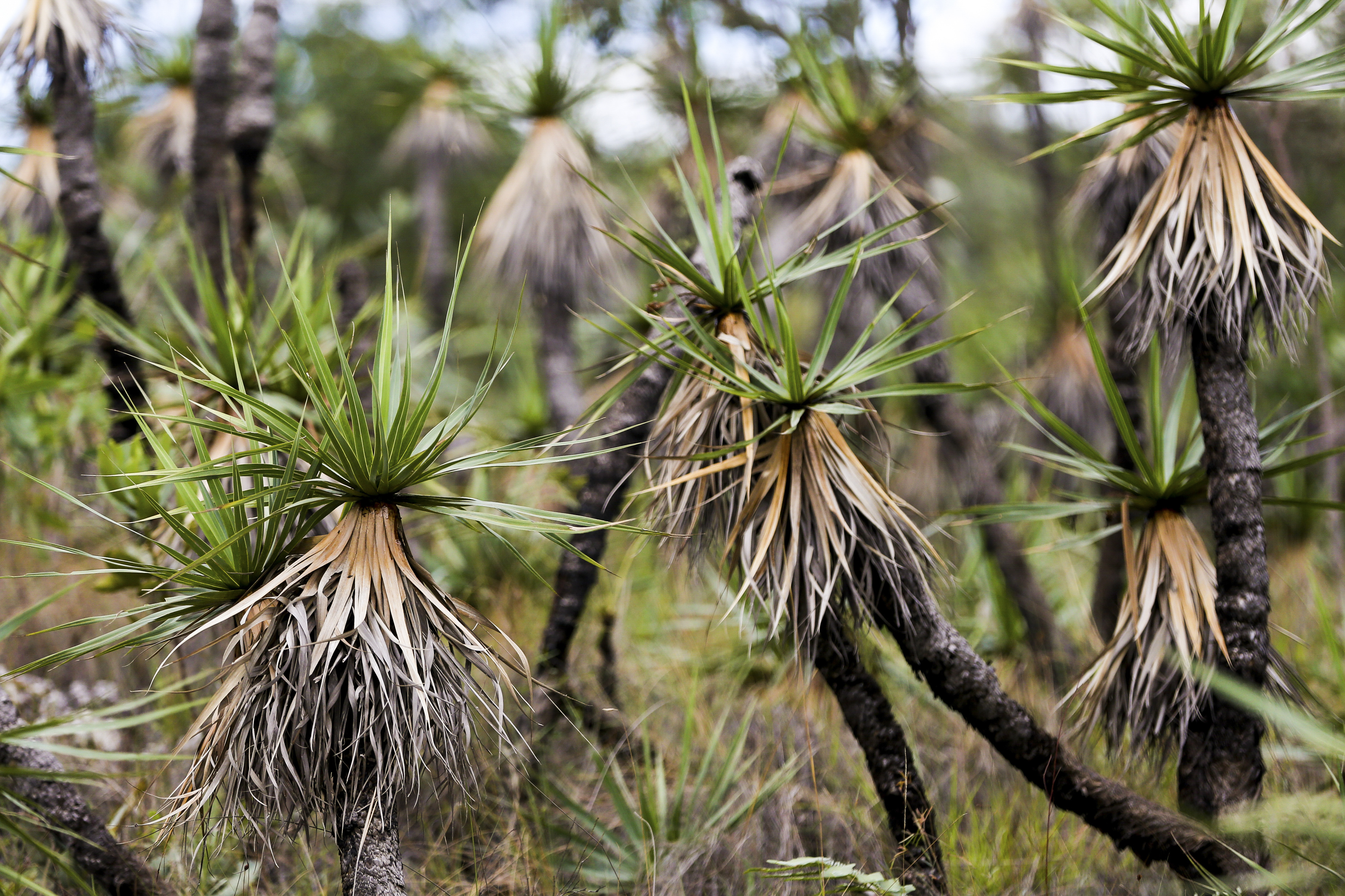 Alto Paraíso (GO) - Planta conhecida como Candombá, uma das mais comuns na região do Parque Nacional da Chapada dos Veadeiros.